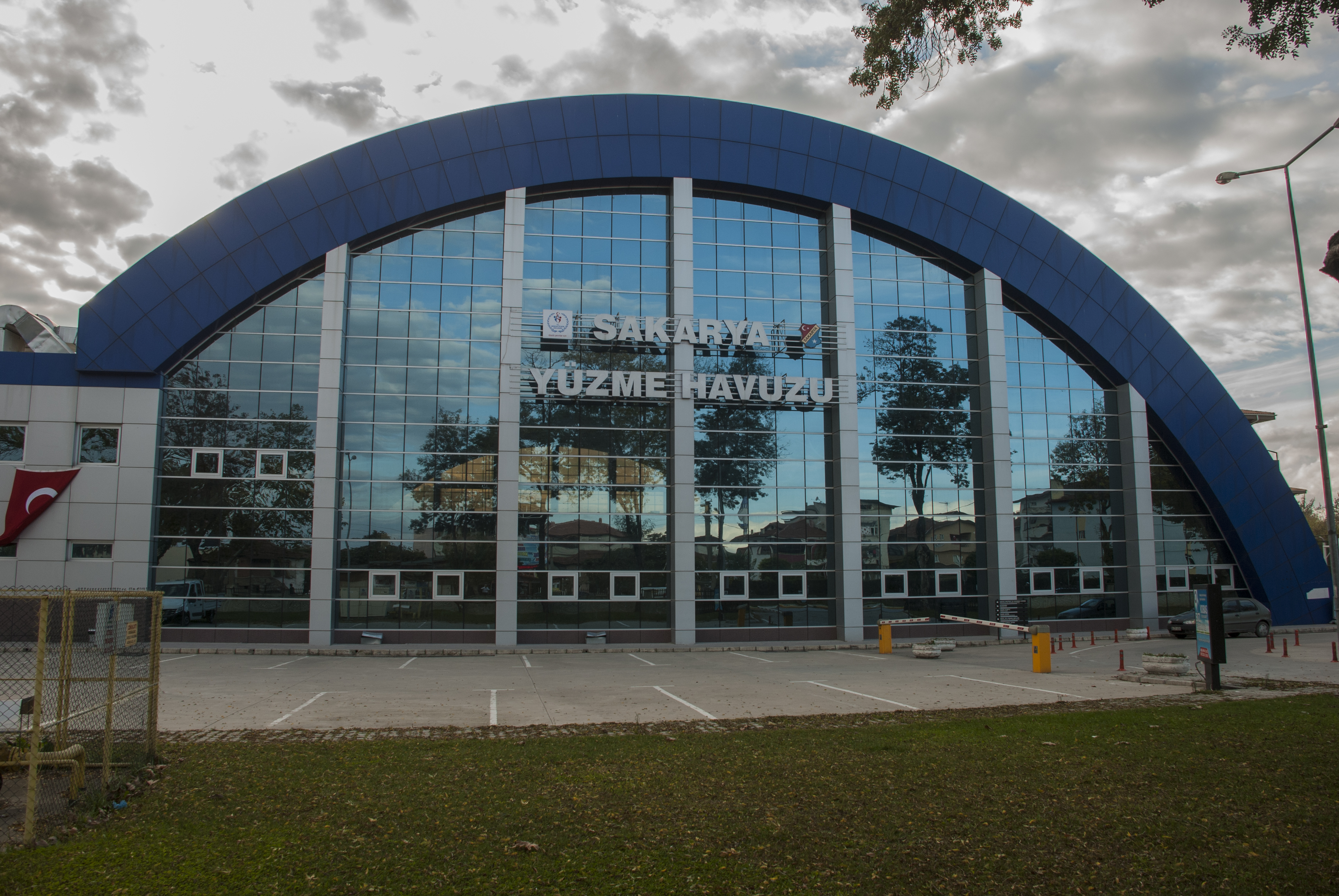 Sakarya yüzme havuzu.